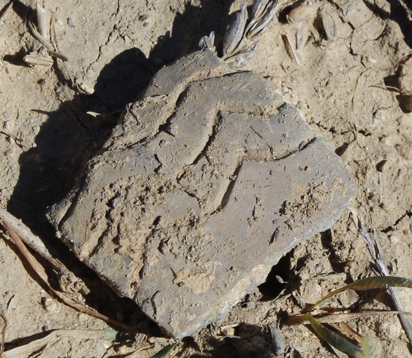 Fragmento de cerámica de pastas grises con decoración incisa encontrada en superficie.